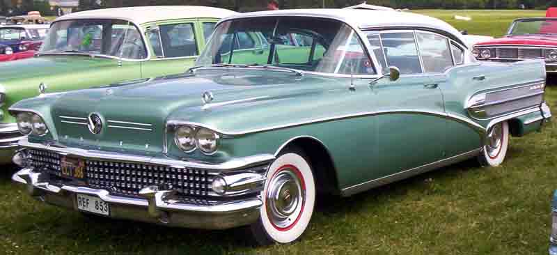 1958 Buick Roadmaster Series 75 Model 75 4-door Hardtop